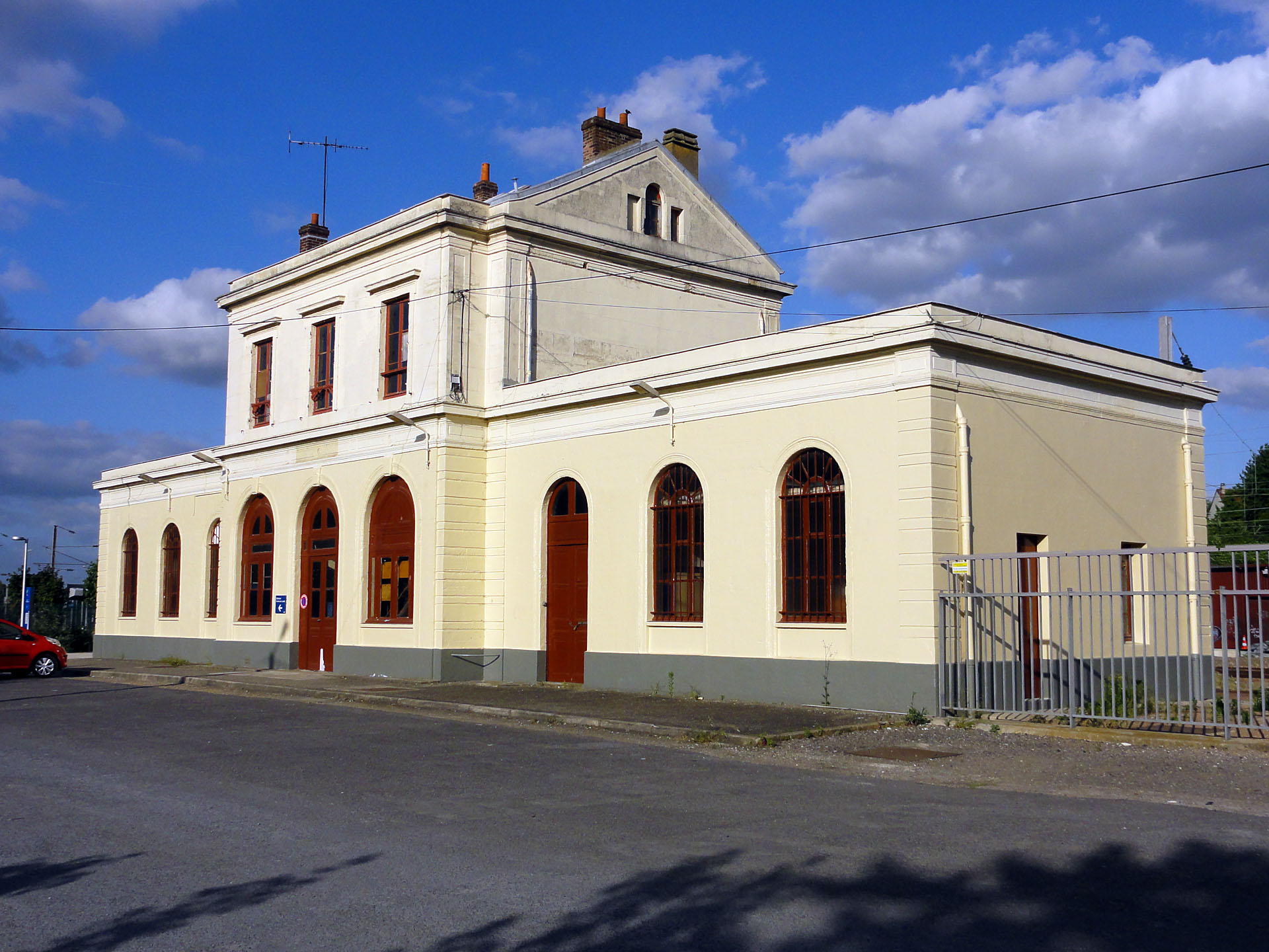 La gare d'Épluches à Saint-Ouen-l'Aumône, Val-d'Oise, France.